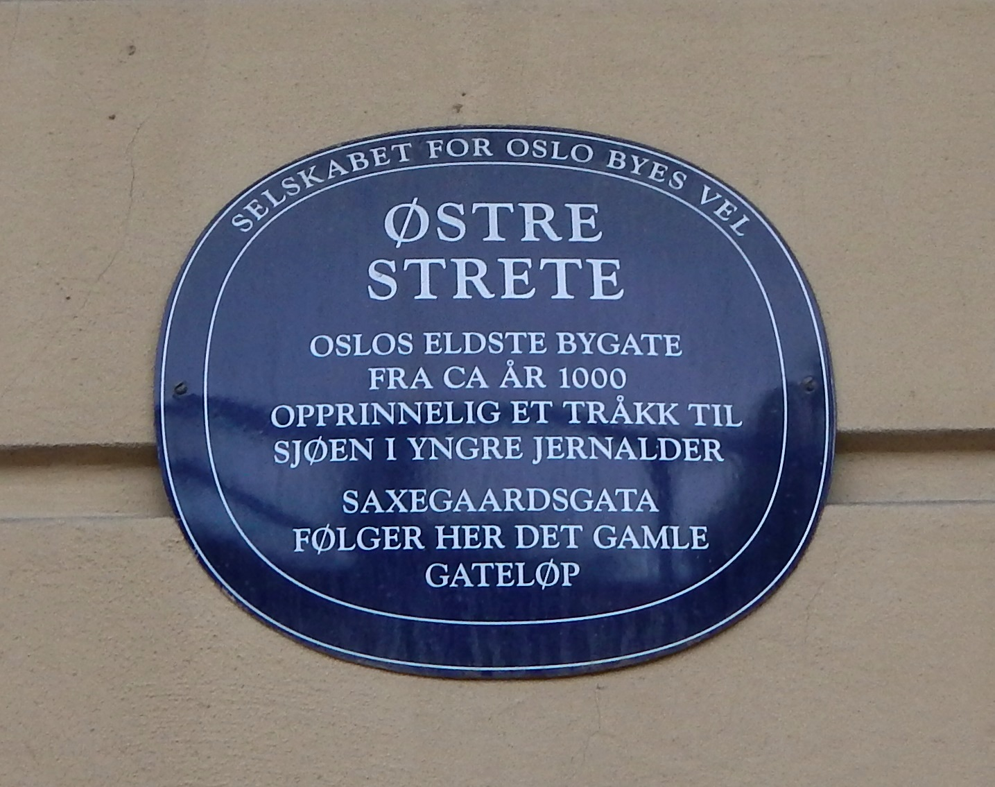 Blått skilt til minne om middelaldergaten Østre strete på husveggen i Saxegaardsgata 3